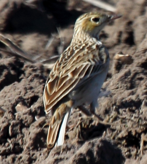 Sprague's Pipit (Anthus spragueii)